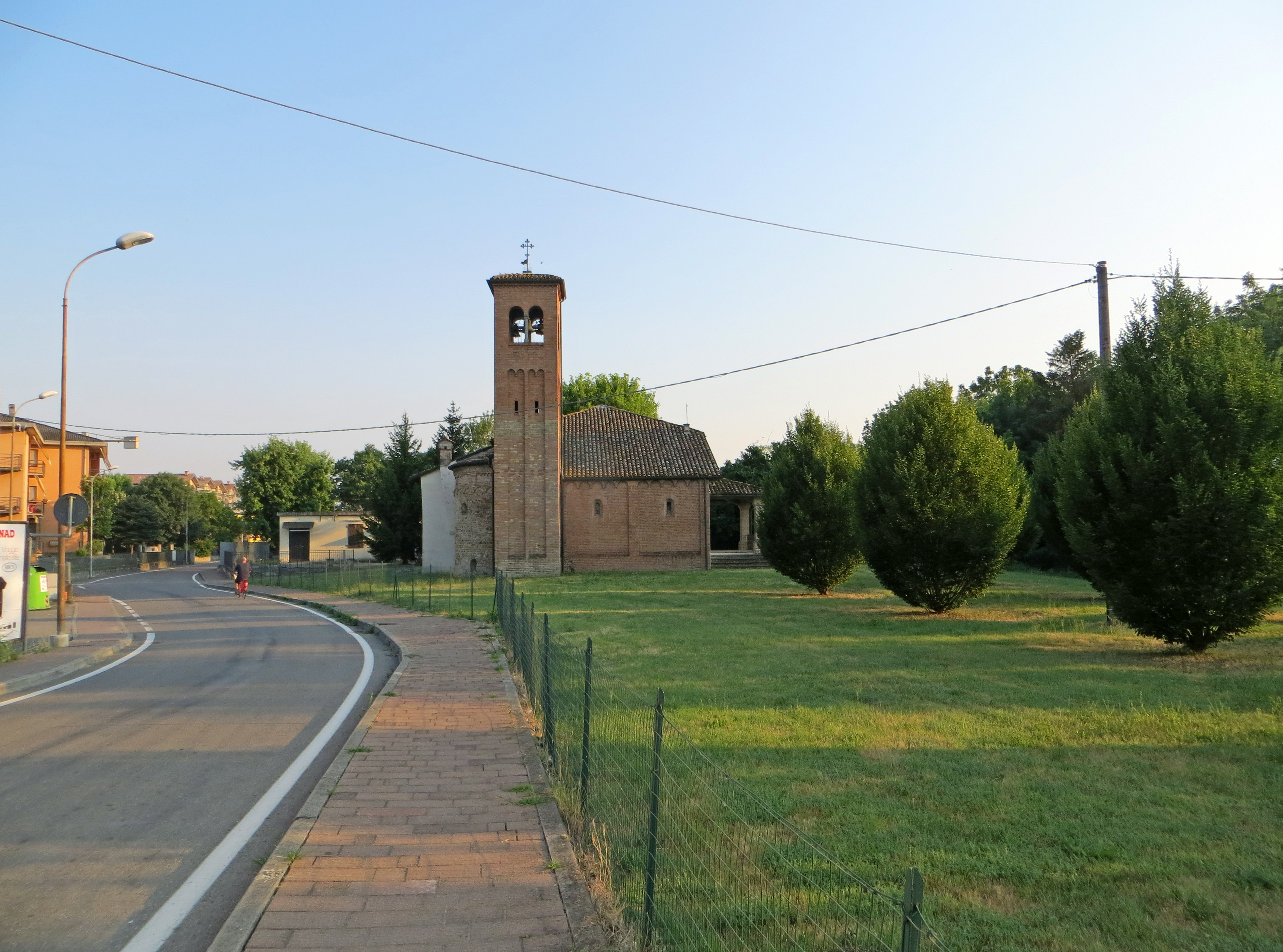 Chiesa dei Santi Simone e Giuda (Sanguinaro) - lato nord